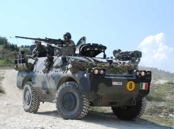 APC Puma in versione 4x4, esercito italiano